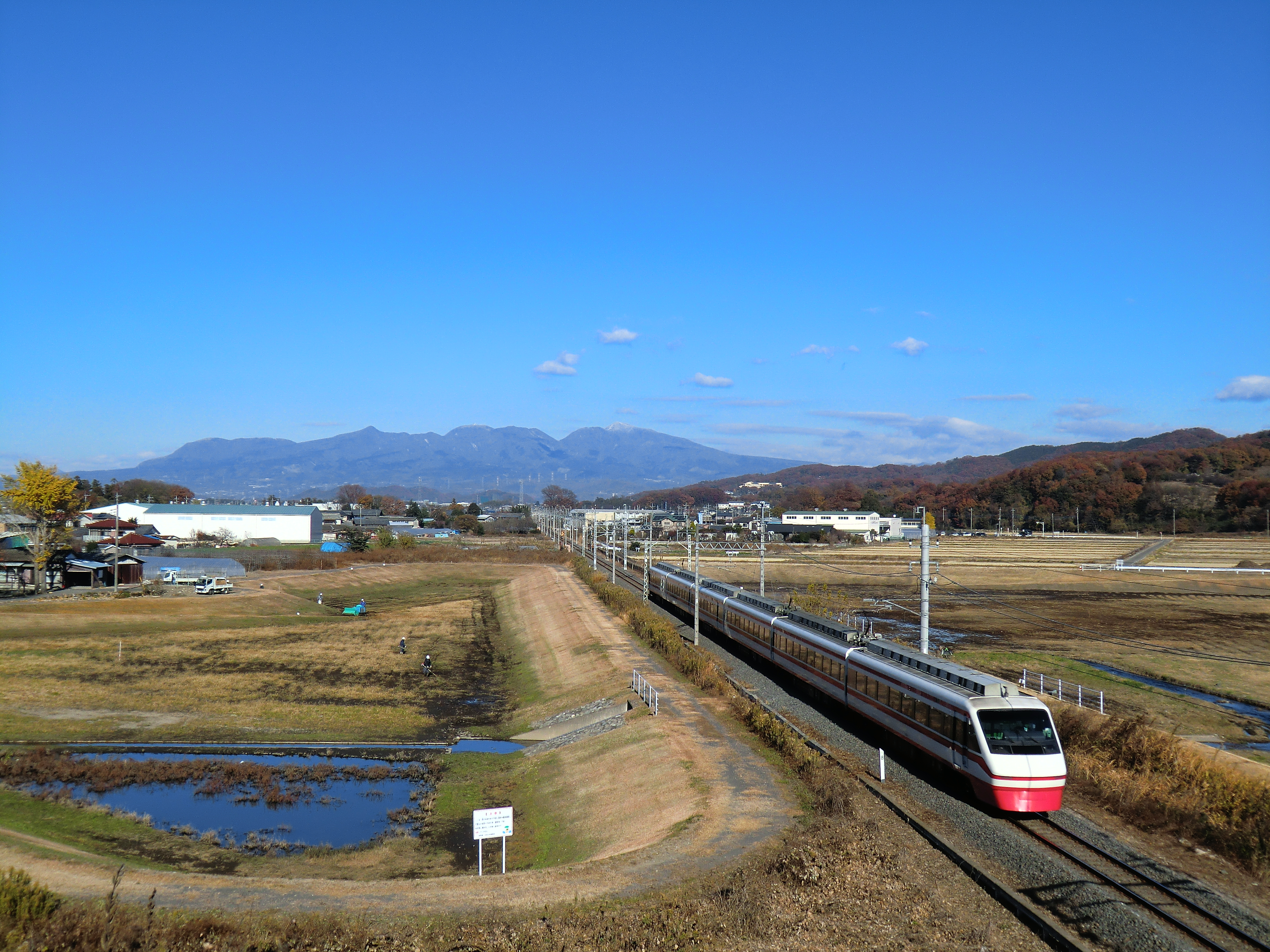 赤城山をバックに東武桐生線を走る特急りょうもう号。